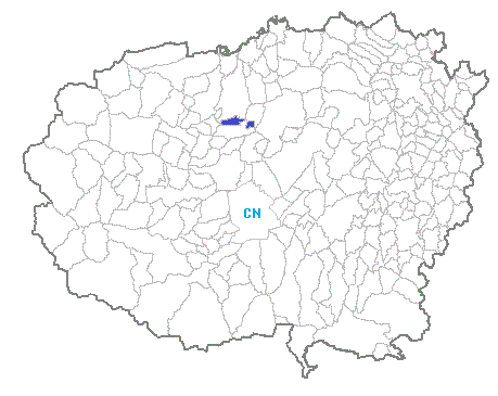 Posizione del comune nella provincia di Cuneo